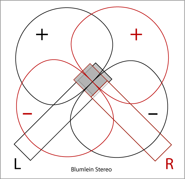 Blumlein stereo microphones